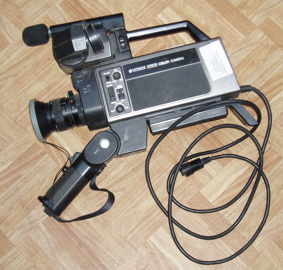 Hitachi color video camera